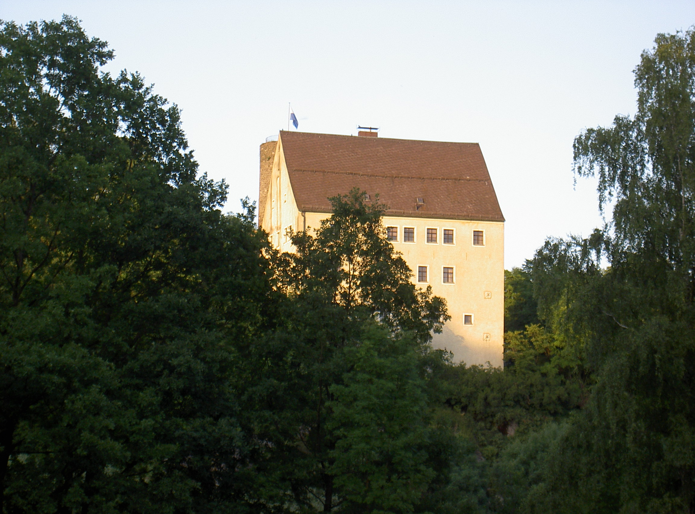 Burg Neuhaus (Windischeschenbach)